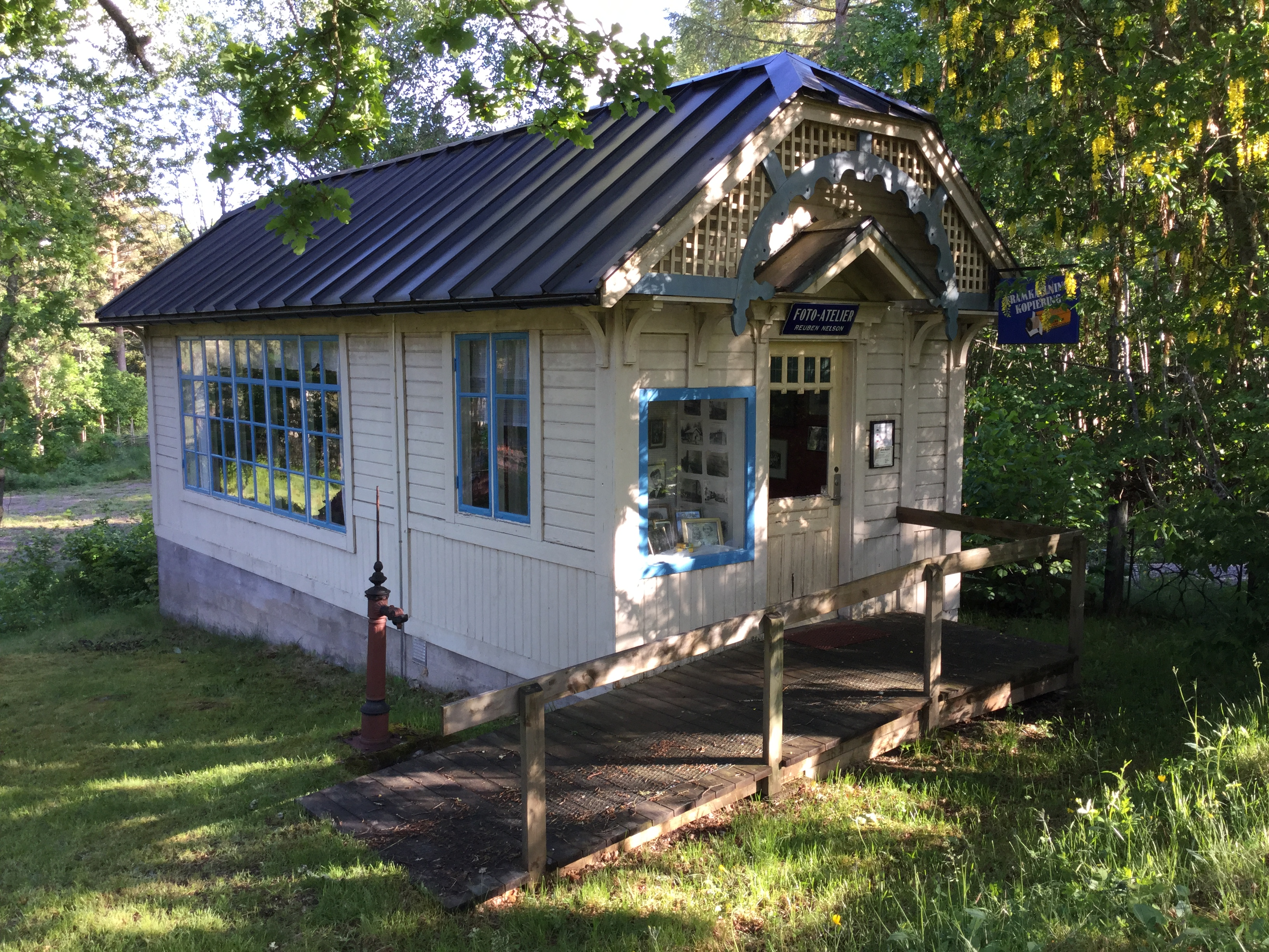 Reuben Nelsons fotoateljé i Virserums hembygdspark i Småland, Hultsfreds kommun, Kalmar län, juni 2017.